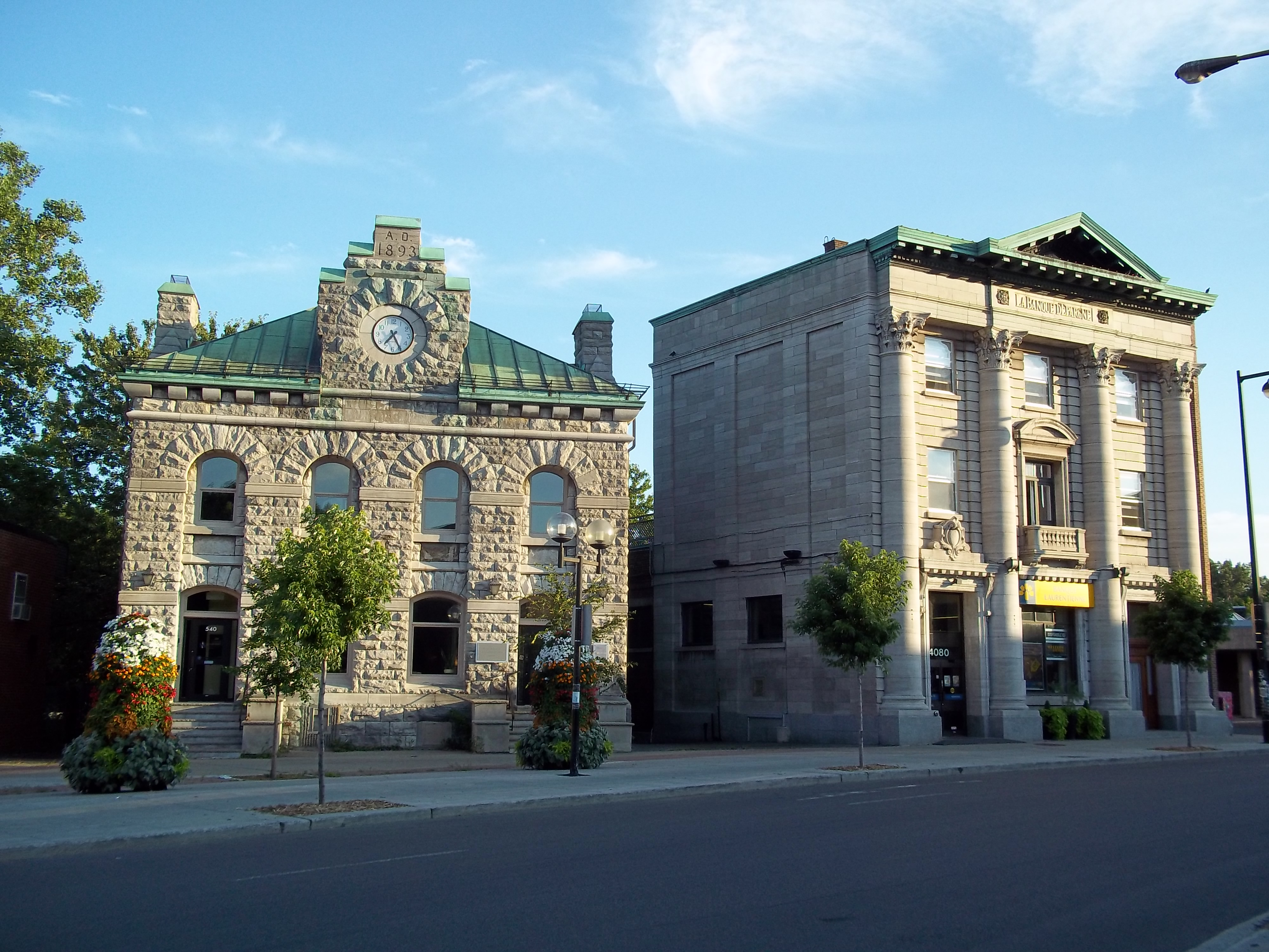 Deux édifices, place Saint-Henri et rue Saint-Jacques, Montréal À gauche : Bureau de poste Saint-Henri, 540, place Saint-Henri Patrimoine : Bureau de poste de Saint-Henri À droite : Banque d'Épargne de la Cité et du District de Montréal, 4080-4082, rue Saint-Jacques